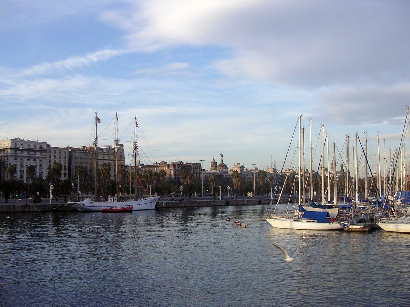 Фотографиjа старе луке Барселоне у предвечерје Ова фотографија је направљена у Барселони 2004 године. Аутор: Славен Косановић. Објављена на српској википедији под доле наведеном лиценцом. --Славен Косановић 15:37, 4 децембар 2005 (CET)